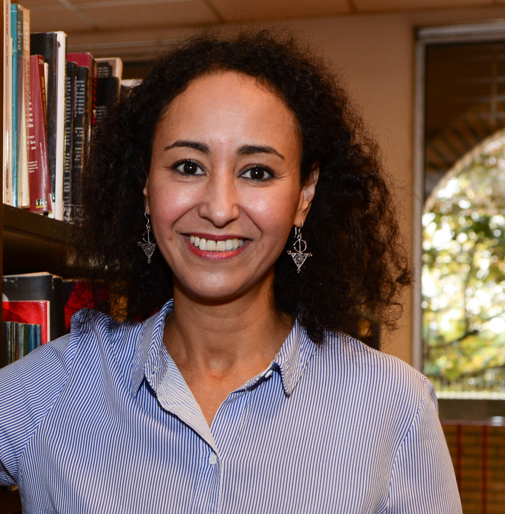 La poétesse franco-marocaine Jamila Abitar